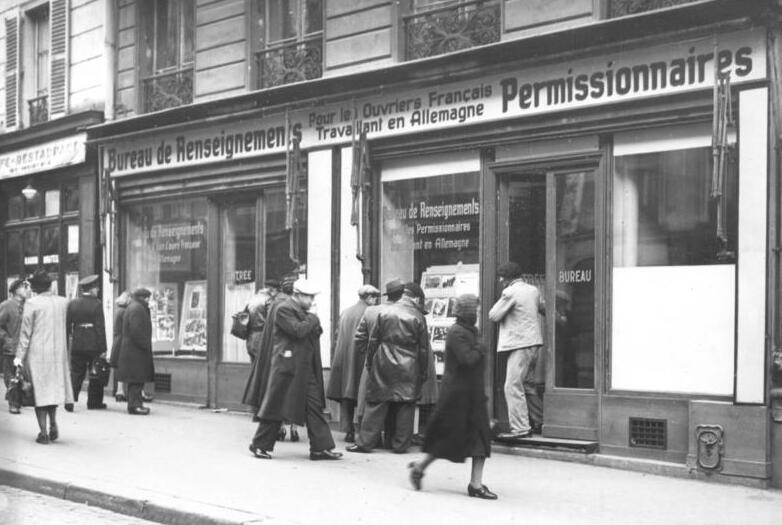 Paris, Werbung für Arbeit in Deutschland Un Bureau de Renseignements pour les Travailleurs Francais en Allemagne Permissionnaires... ...institution devenue deplus en plus nécessaire, vient de s´ouvrir au No. 132, Faubourg Saint Denis, á Paris. FULGUR (Pala) 4.II.43 [Herausgabedatum] 898-43 [Paris, Saint Denis.- deutsches (Werbe-)Informationsbüro für französische Arbeitskräfte in Deutschland]